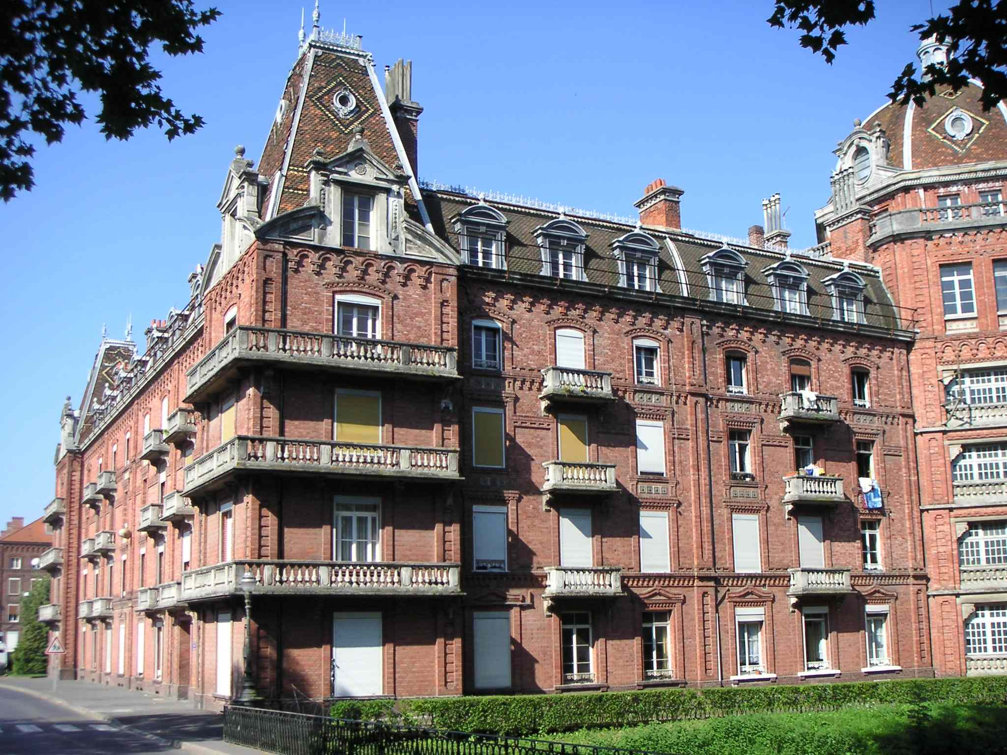 Une photo du Familistère aile gauche prise prise par User:LonganimE le 03/sept/2005.